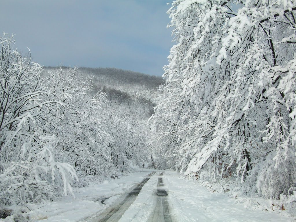 Зима в Черна могила (декември 2010)